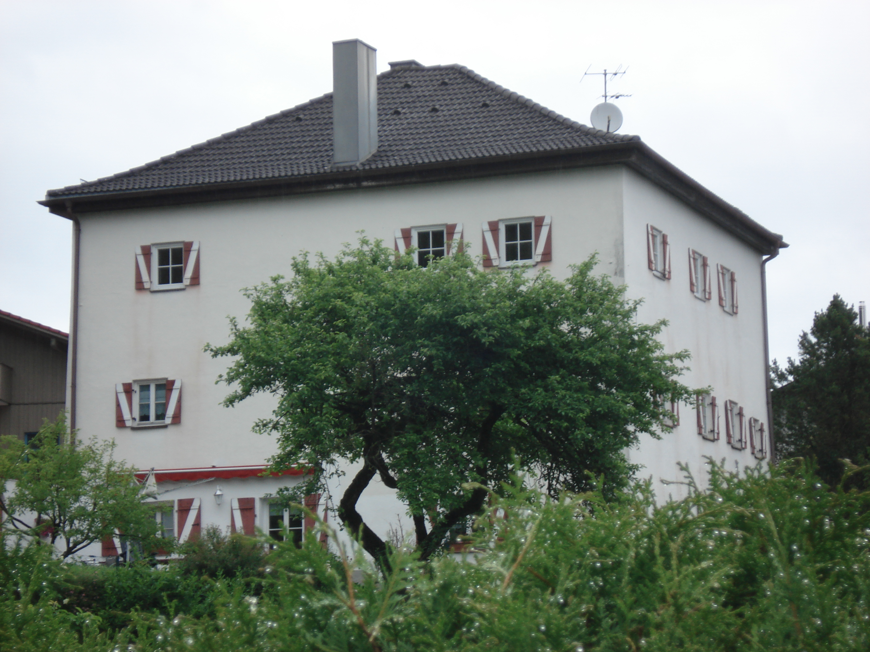 Mauthaus in Piding, Ortsteil Mauthausen, Salzstrasse 2 ehemals Mauthaus, dreigeschossig, mit Walmdach, wohl 18. Jh.; stuckierte Decken, geschnitzte Türen; heute Wohnhaus